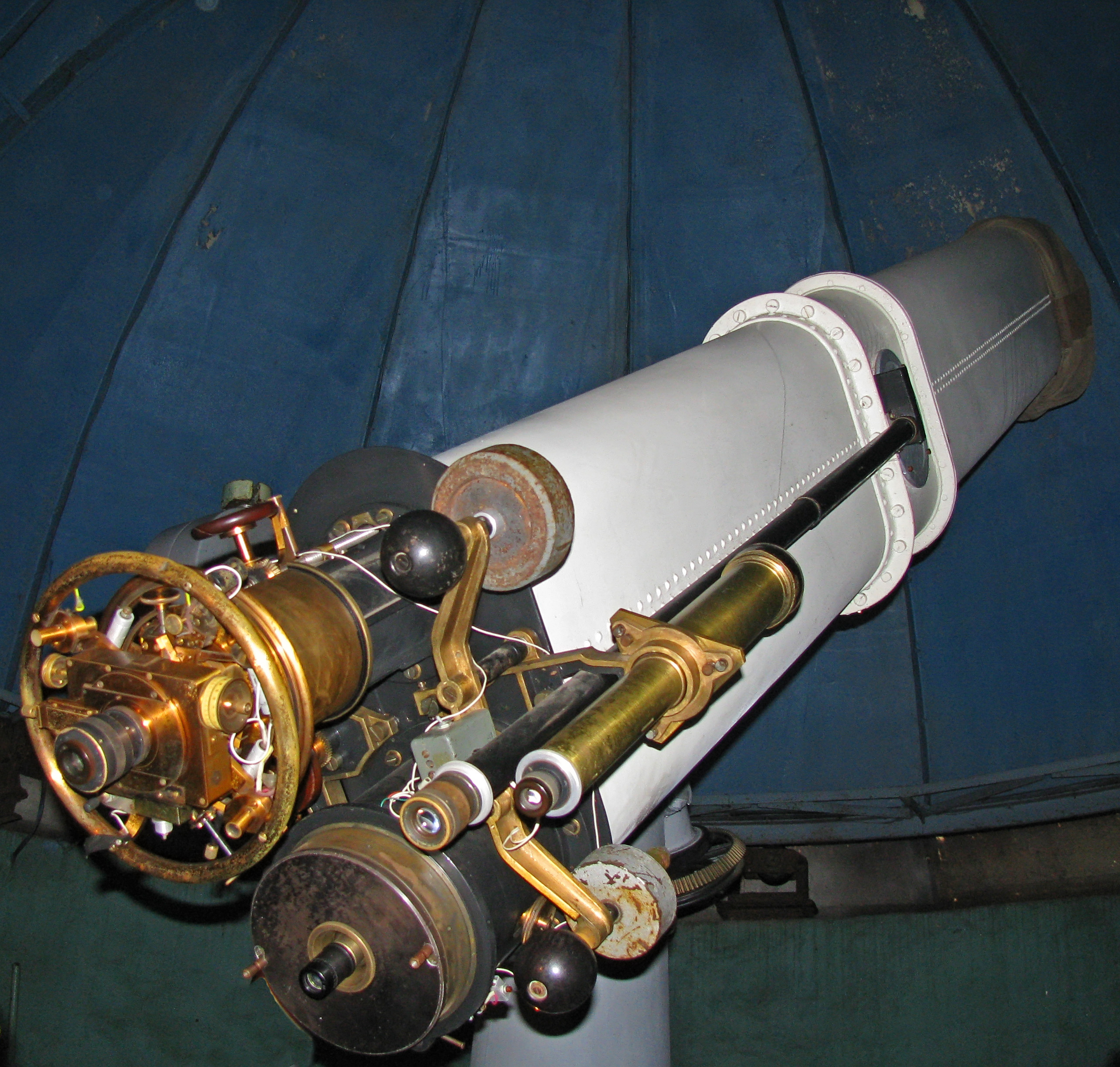 Рефрактор-астрограф Мерца-Репсольда з павільйоном. Астрономічна обсерваторія Київського університету